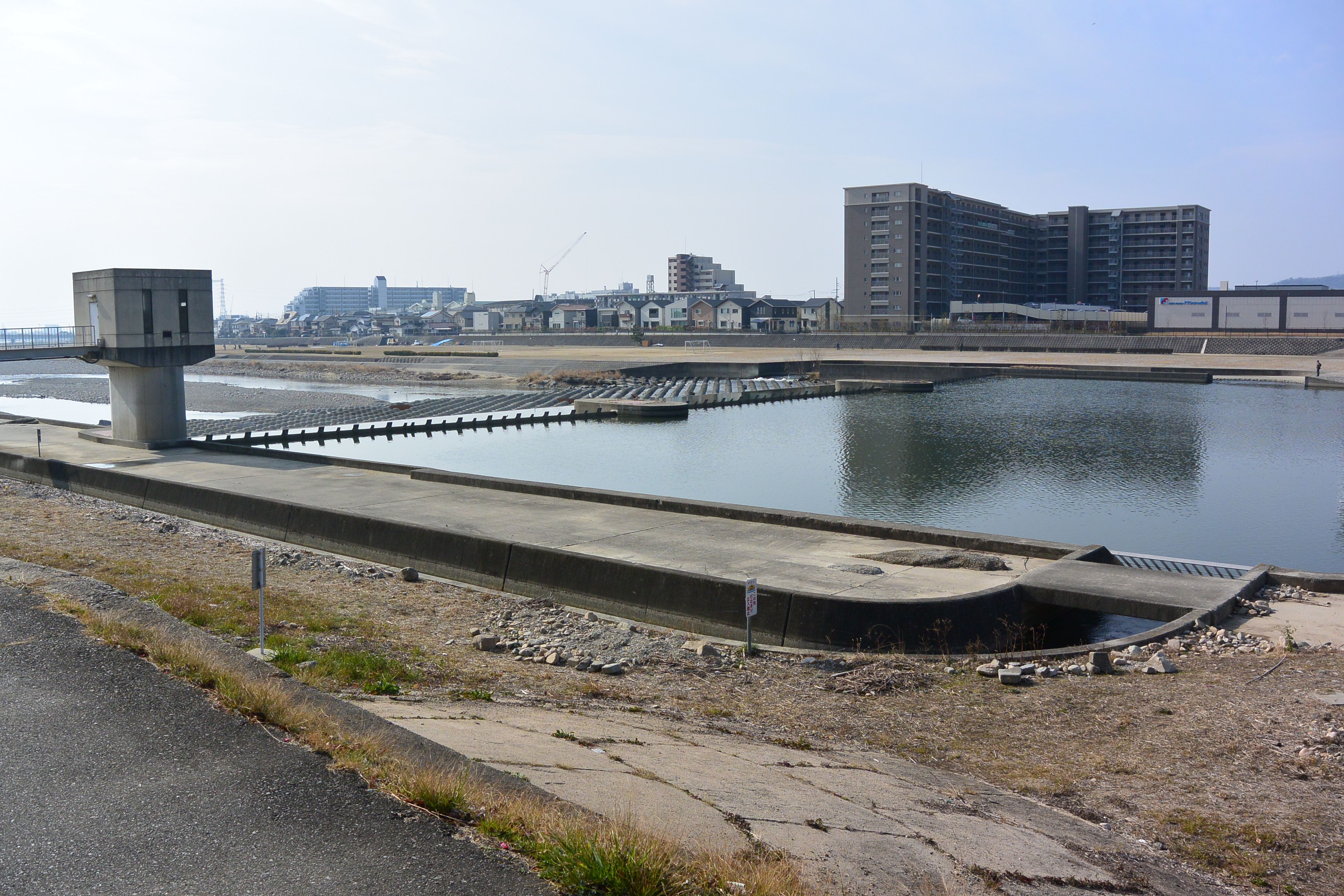 兵庫県伊丹市西部を灌漑する昆陽井の取水口と取水用の堰。宝塚市弥生町にある。地図はこちら。 Nikon 1 AW1 + 1 Nikkor AW 11-27.5mm f/3.5-5.6 Ik heb de GPS coördinaten toegevoegd. De foutenmarge moet tussen ±10 meter liggen. --トトト (talk) 15:23, 23 May 2019 (UTC)